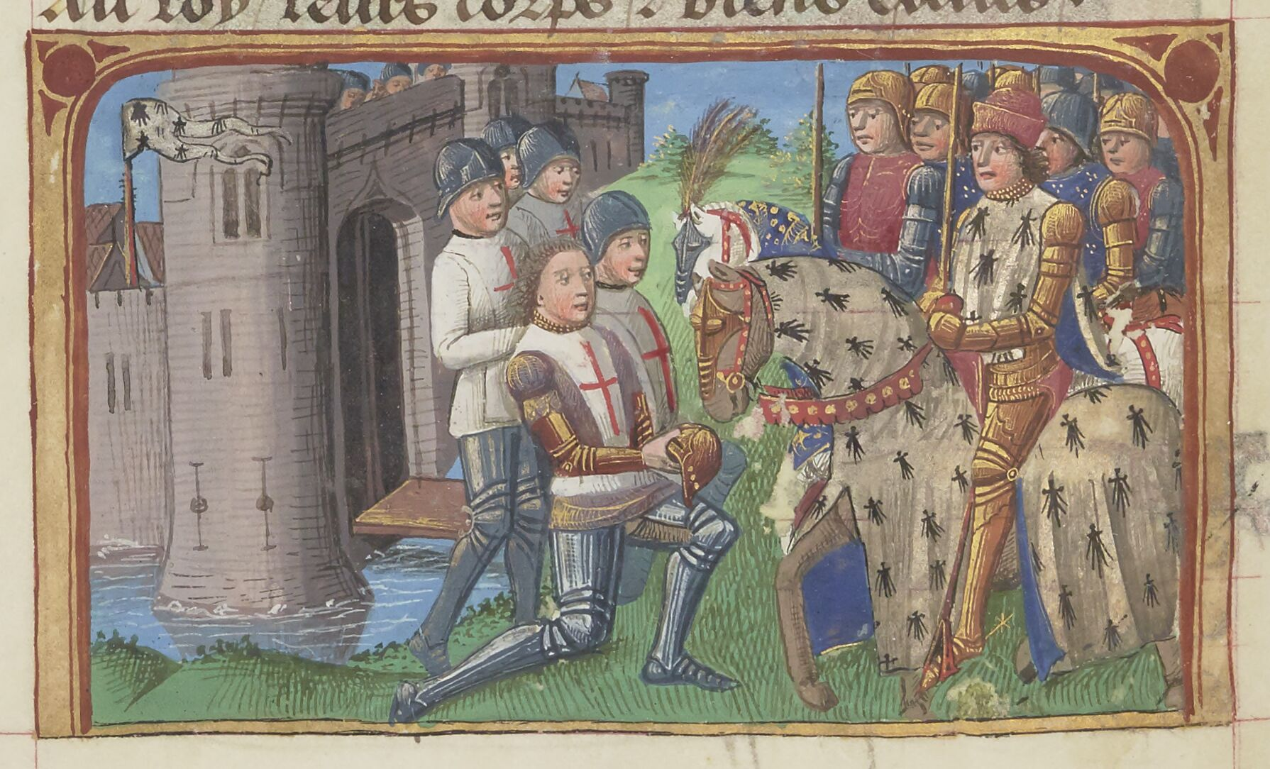 La reddition de Fougères, par Martial d'Auvergne, enluminure issue de l'ouvrage Vigiles de Charles VII, Paris, France, XV°siècle